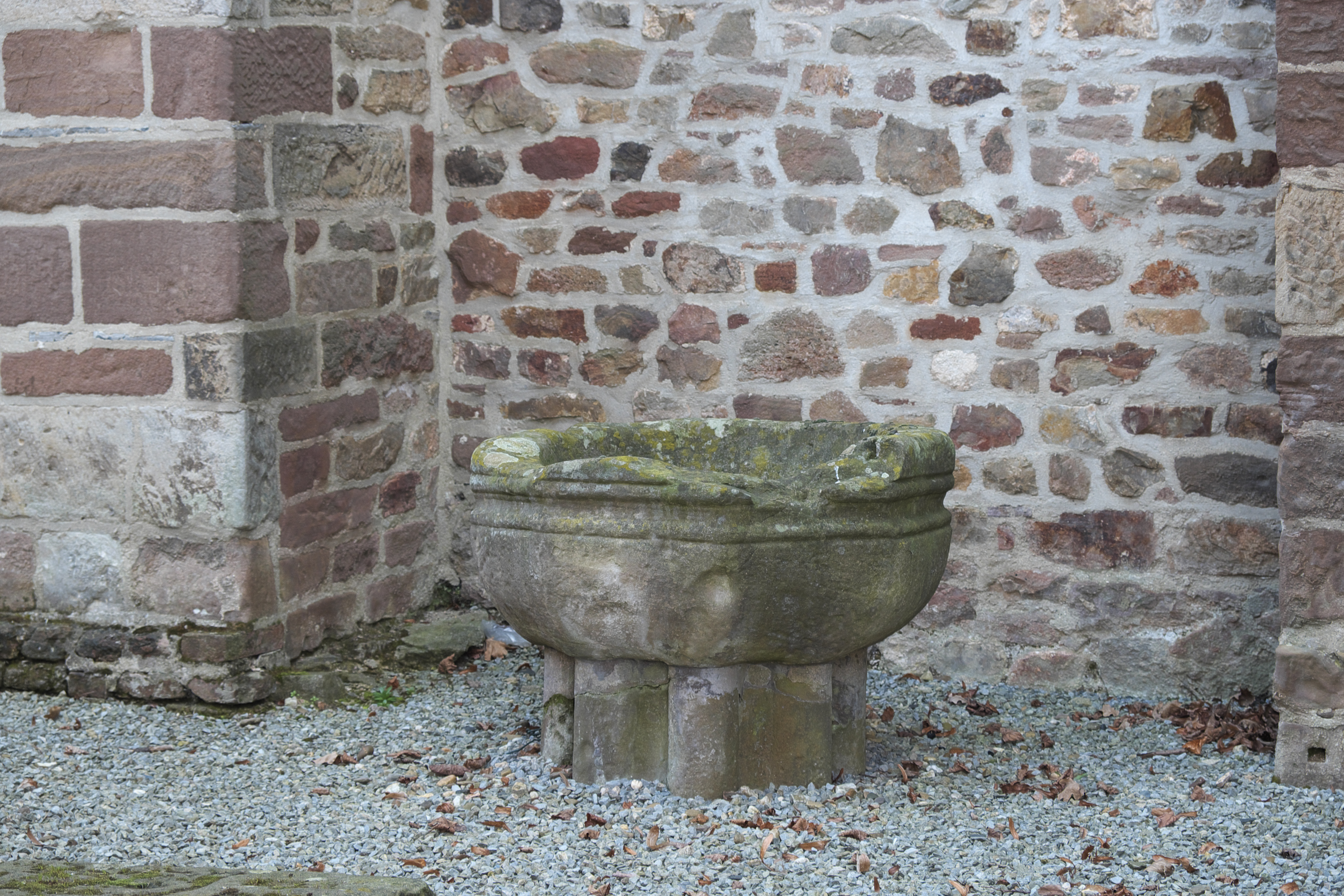 Kirche Klein St. Arnold (Arnolduskapelle) in Arnoldsweiler im Kreis Düren in Nordrhein-Westfalen (Deutschland), romanischer Taufstein